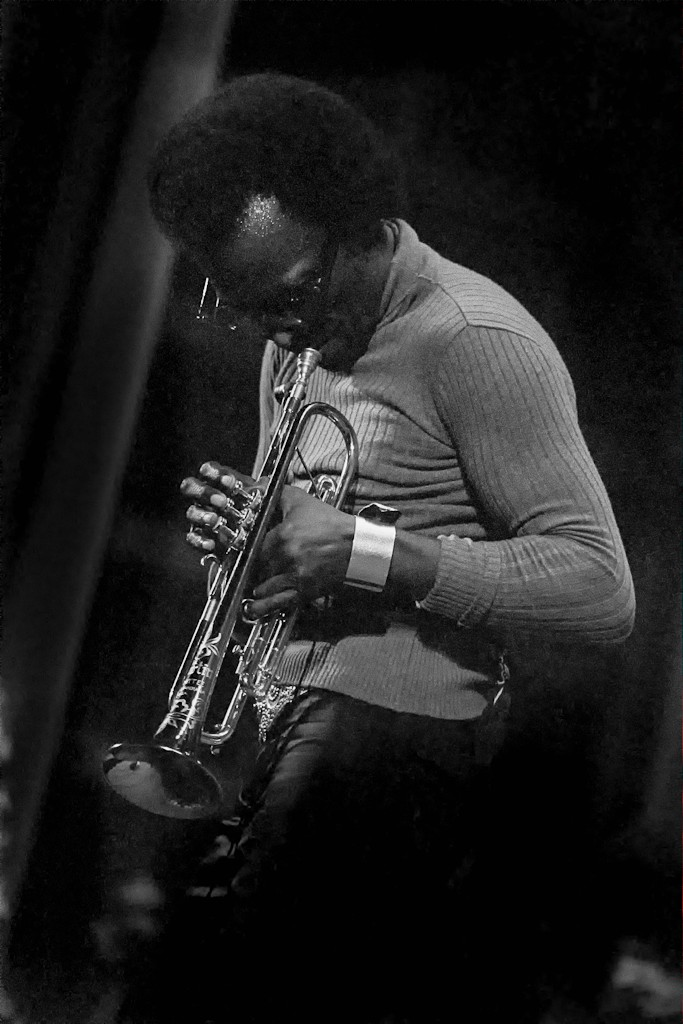 Miles Davis Septet Sigma 7